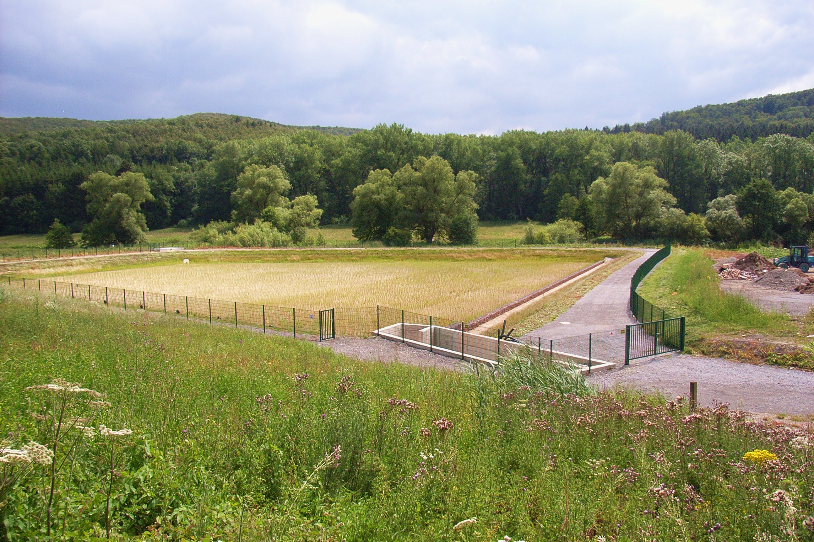 Retentionsbodenfilterbecken im Hilgenbachtal. Es liegt direkt unterhalb des Bau- und Betriebshofes und wurde im Jahr 2010 angelegt.